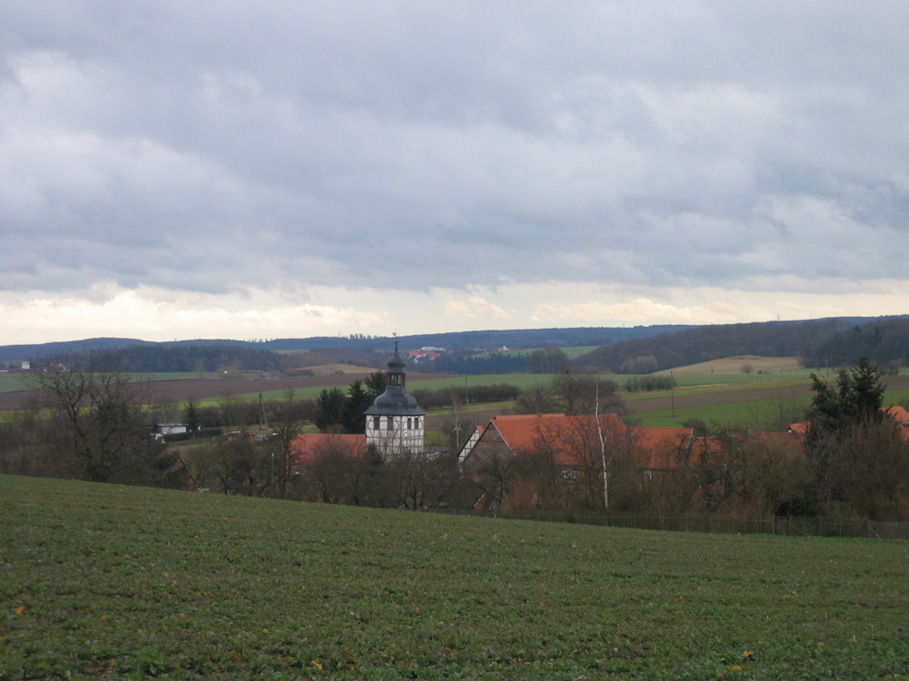 Molmerswende, Mansfelder Land, Sachsen-Anhalt, Ansicht von Norden